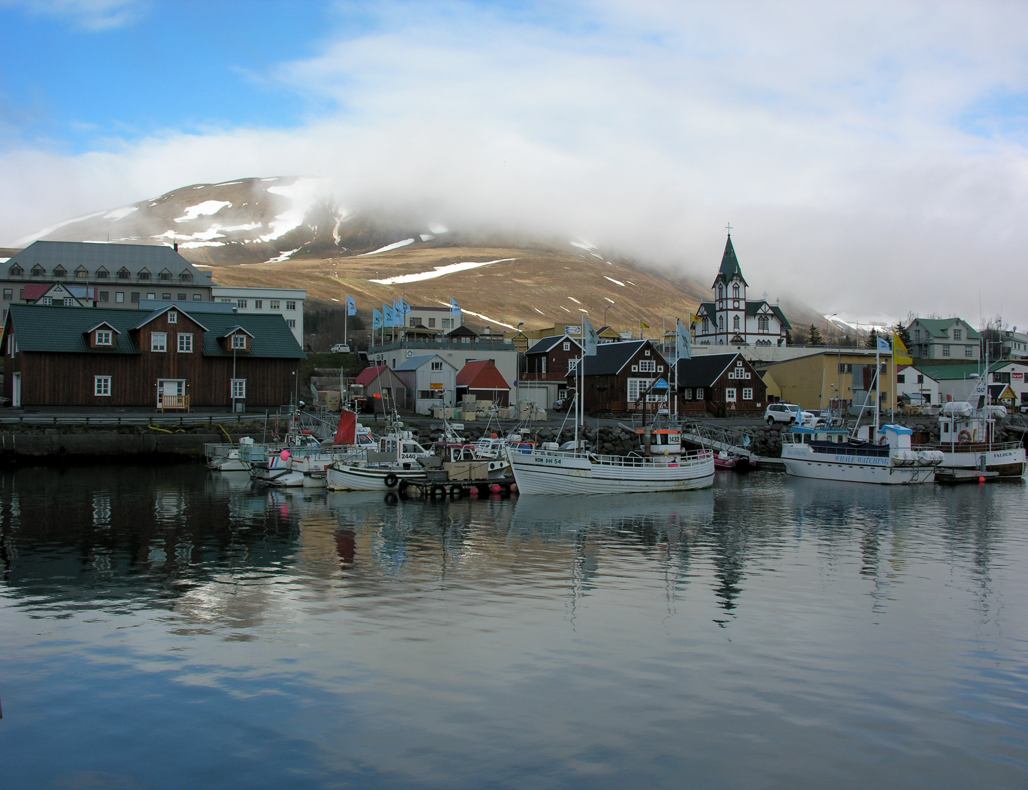 Iceland, Húsavík